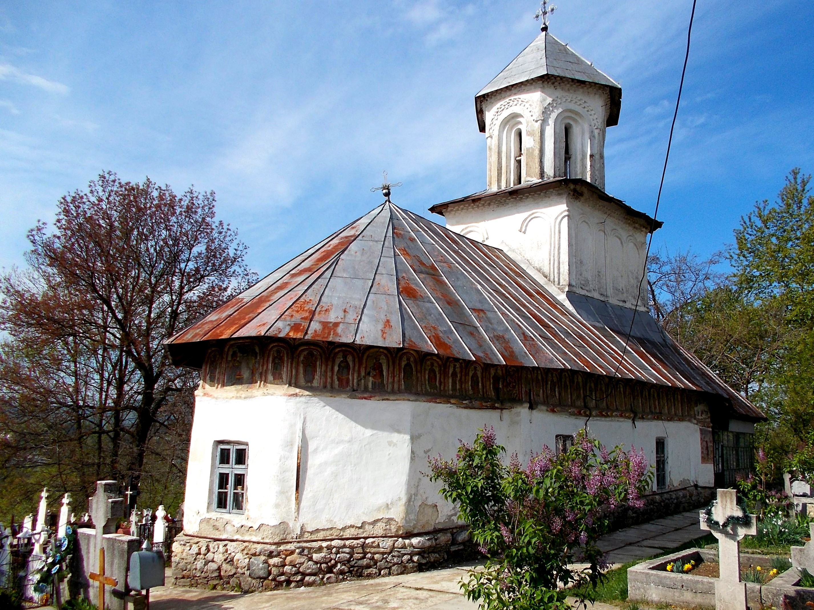 Biserica „Sf. Voievozi”, „Sf. Vasile” - Covrești din Horezu (Olari) județul Vâlcea